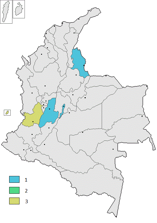 La cantidad de ediciones que se han realizado en cada departamento de los Juegos Deportivos Paranacionales